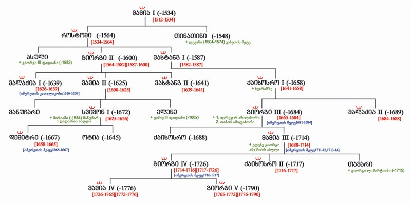 გურიის მთავრები.